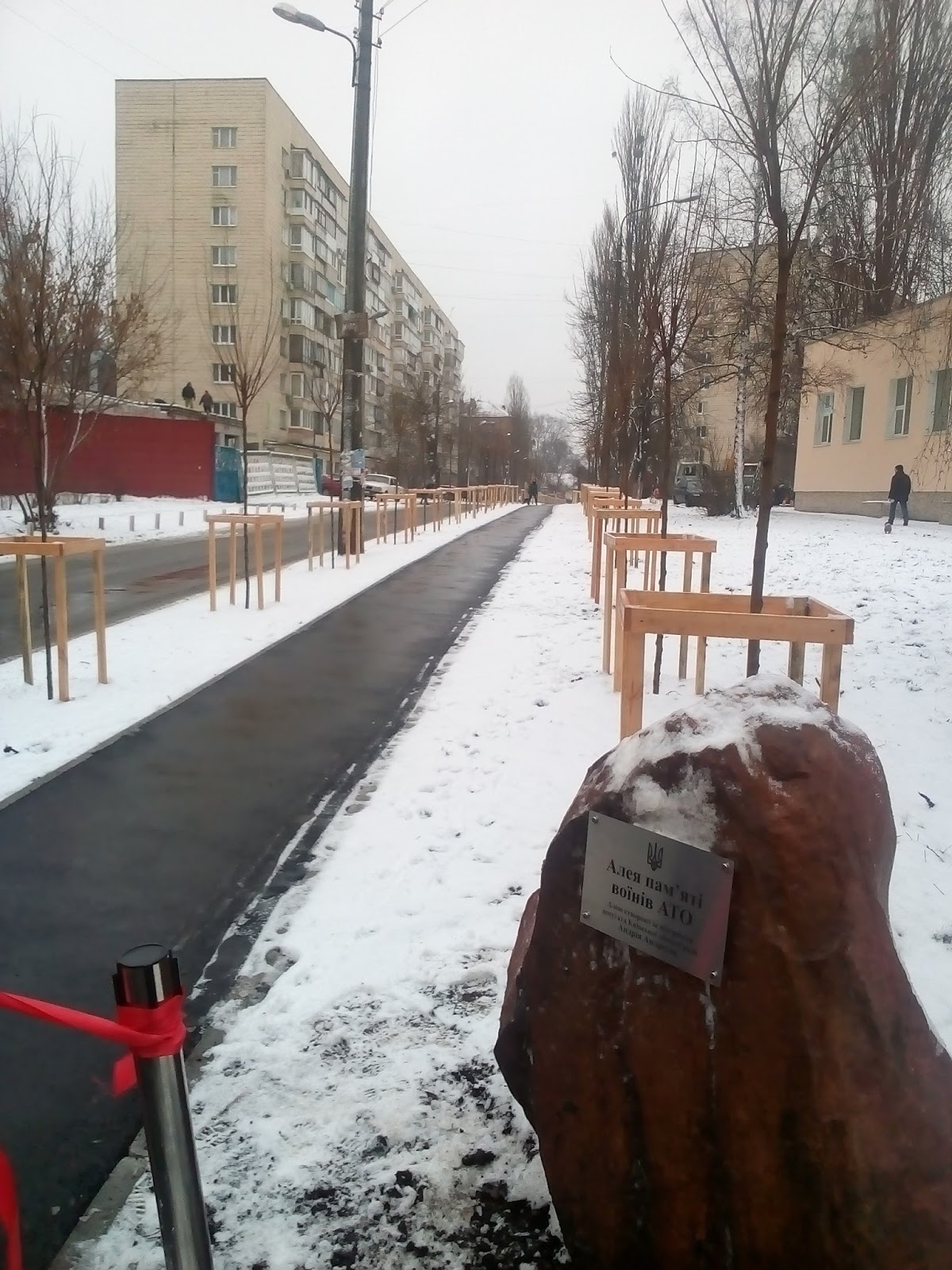 фото